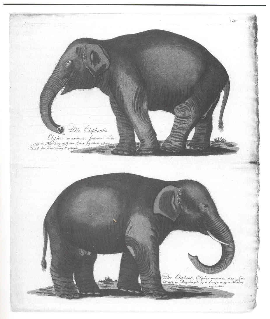 Darstellung der beiden indischen Elefanten der Menagerie Alpi Germanisches Nationalmuseum Nürnberg